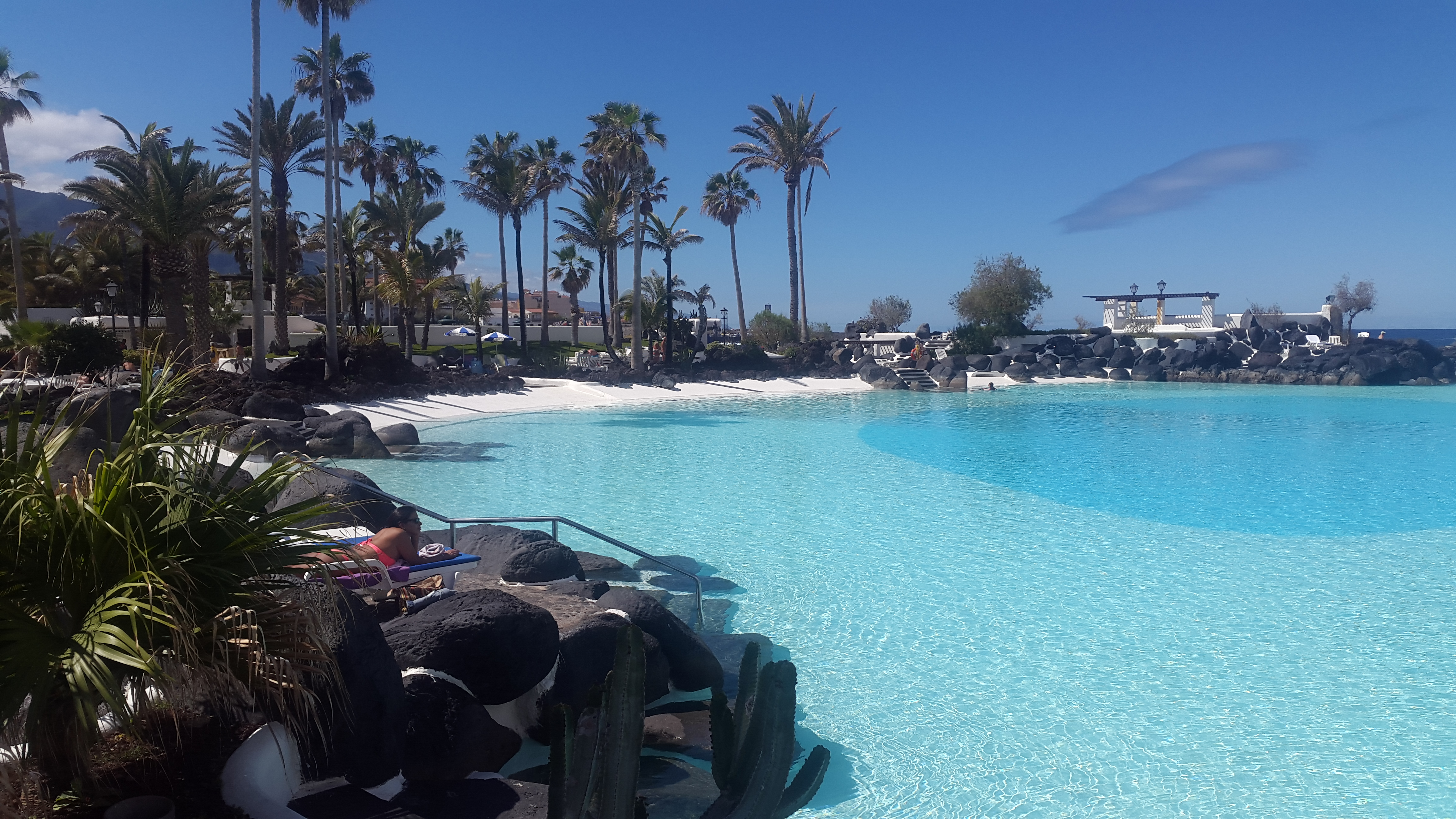 Lago Martiánez